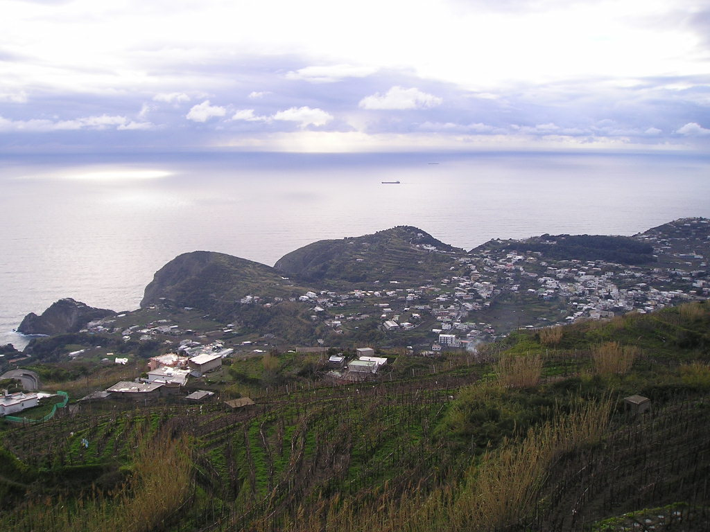 Panza D'Ischia. Veduta di Panza isola D'Ischia